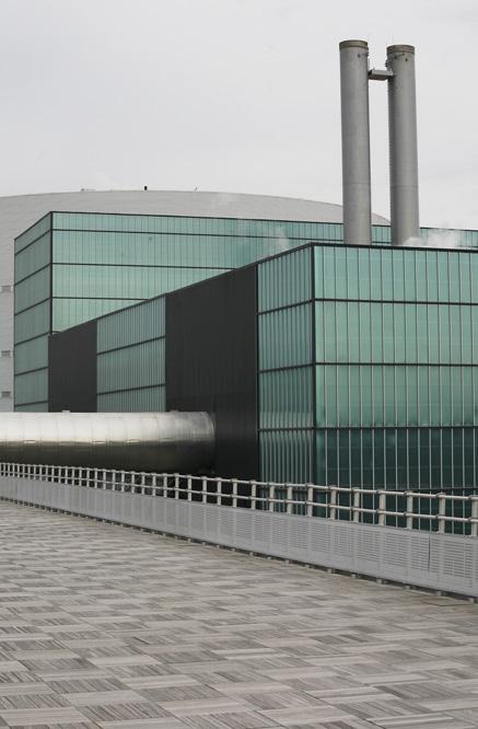 EveRé - Traitement des Fumées